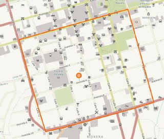 Mapa de El Barrio El Carmen